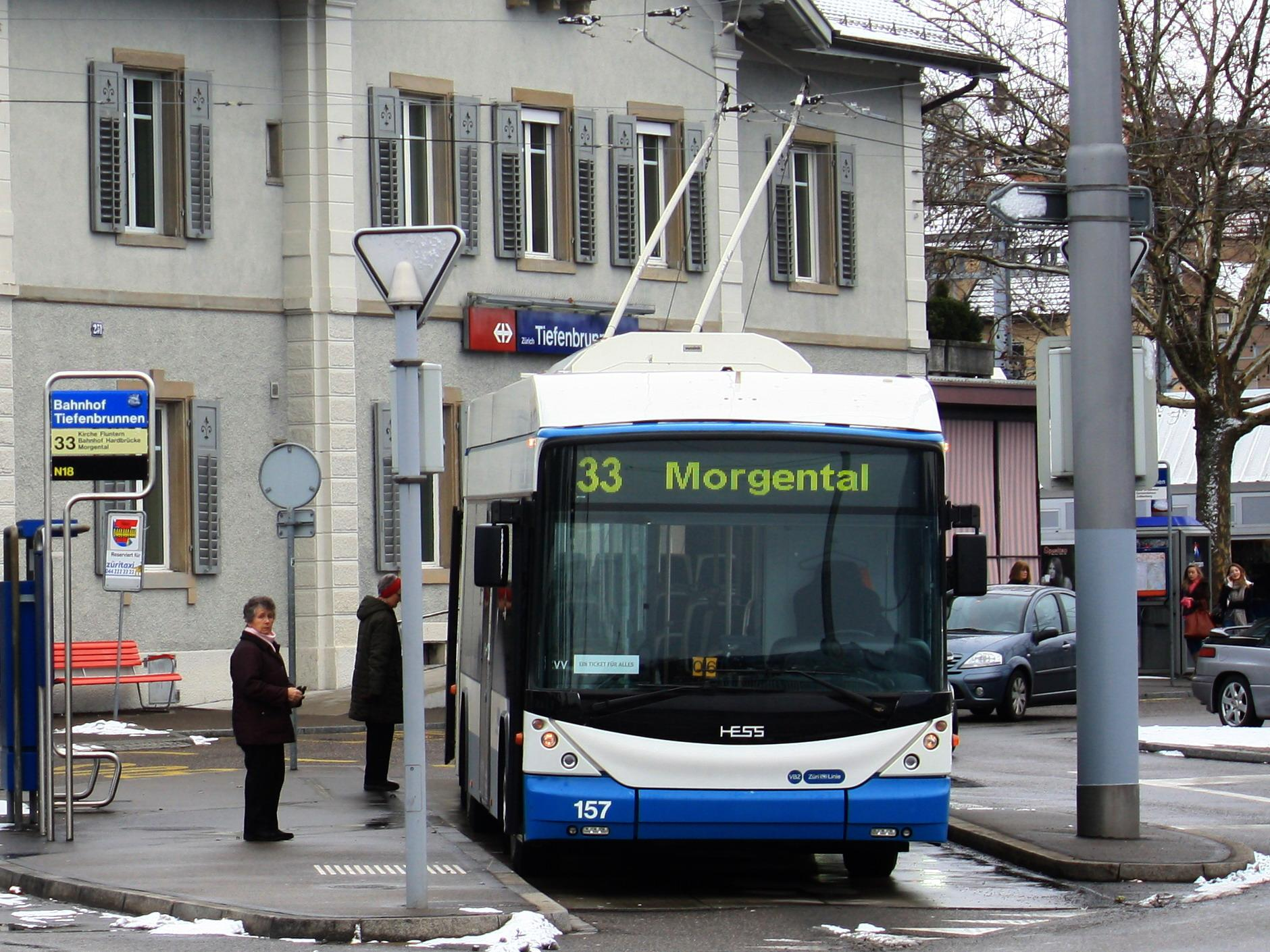 Gelenktrolleybus vom Typ Hess Swisstrolley der Verkehrsbetriebe Zürich an der Endhaltestelle Bahnhof Tiefenbrunnen der Linie 33